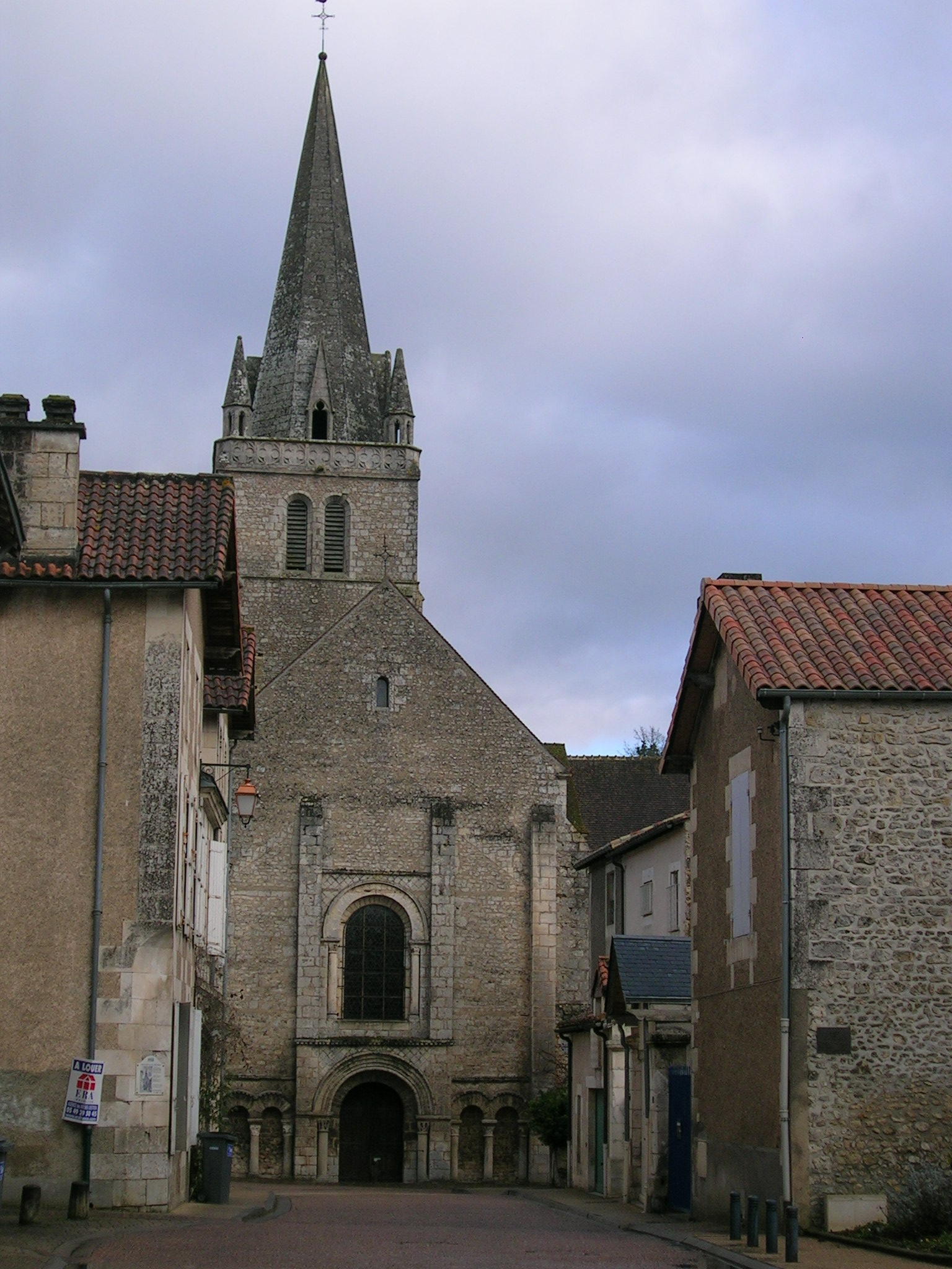 Ancienne abbaye de Saint-Benoît (Vienne, France) aujourd'hui église paroissiale Saint-André.